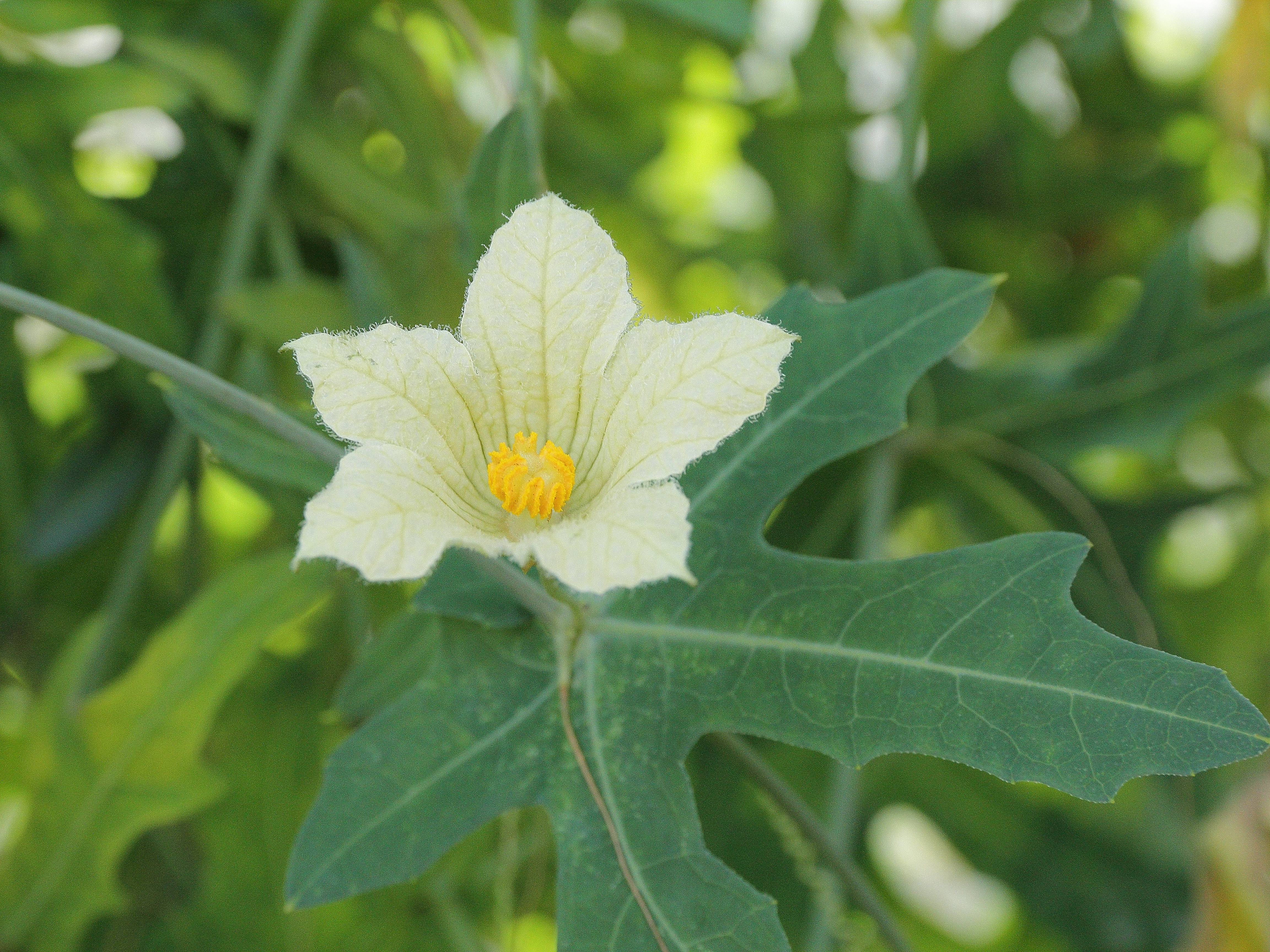 Coccinia sessilifolia i Göteborgs Botaniska Trädgård.